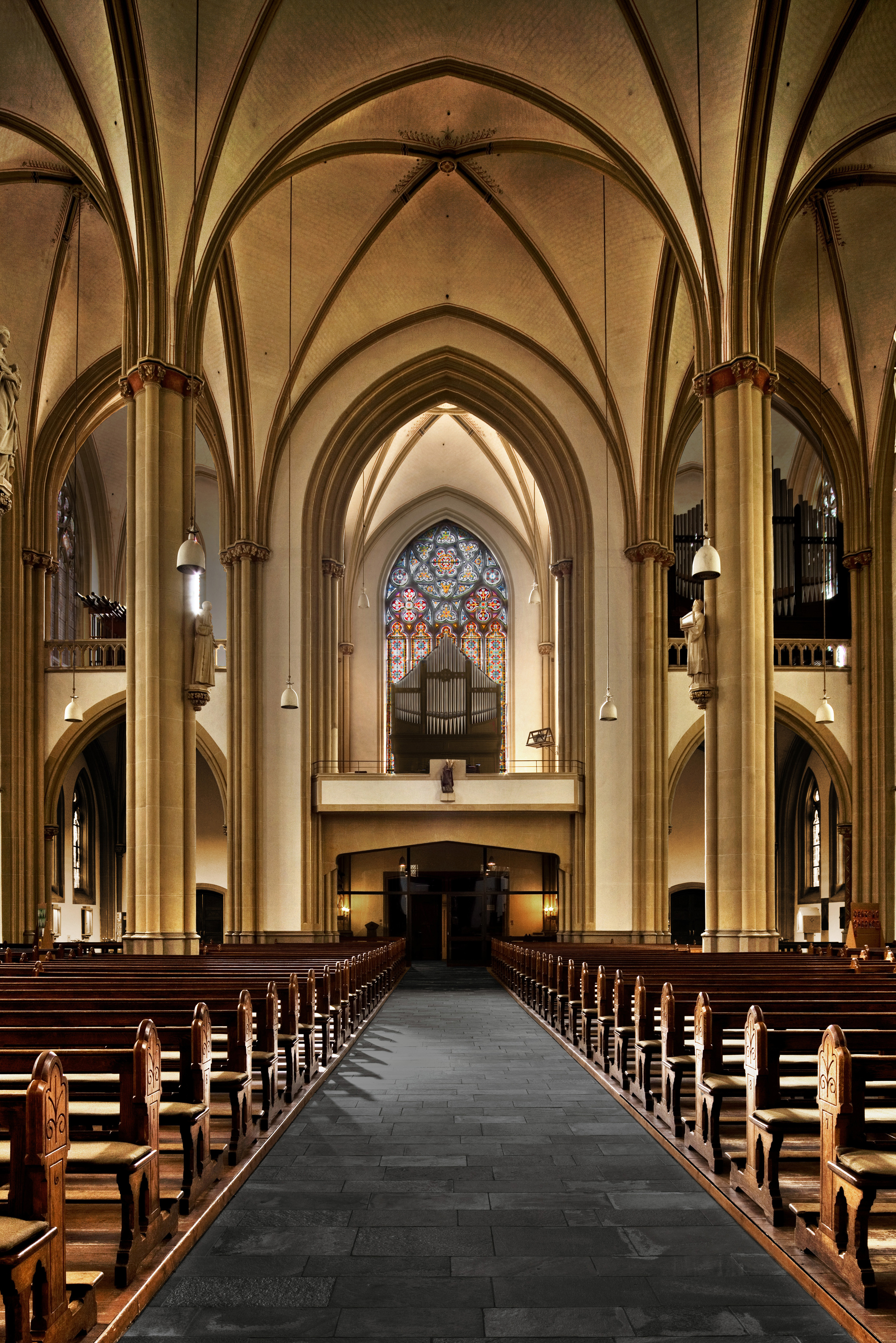 Borghorst, St. Nikomedus, Fleiter-Orgel auf der Westempore This is a photograph of an architectural monument.